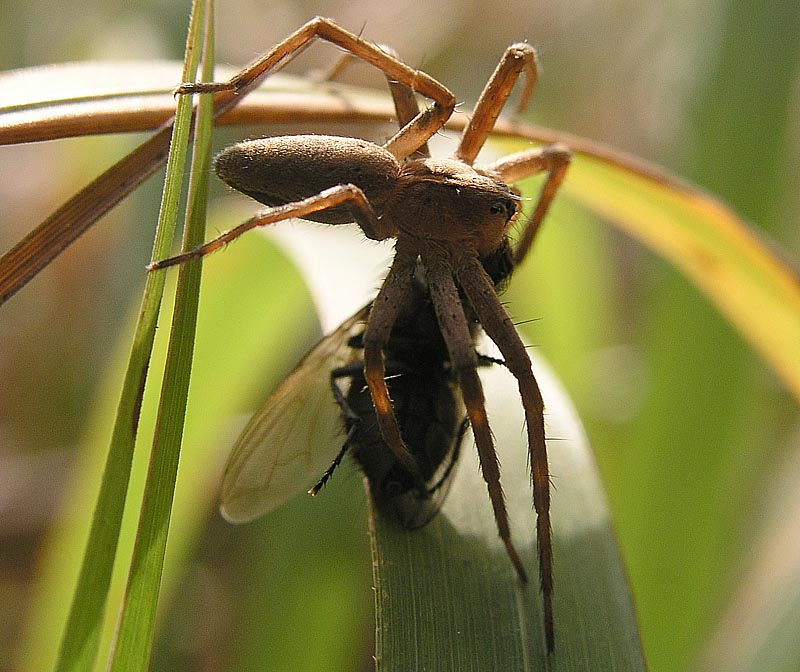 Diese Listspinne (pisaura mirabilis), aufgenommen im Bereich der Nussbaumallee am Hoheberg in Großen-Buseck, hat fette Beute gemacht und ist auf der Suche nach einem geeigneten Platz für eine ungestörte Mahlzeit.